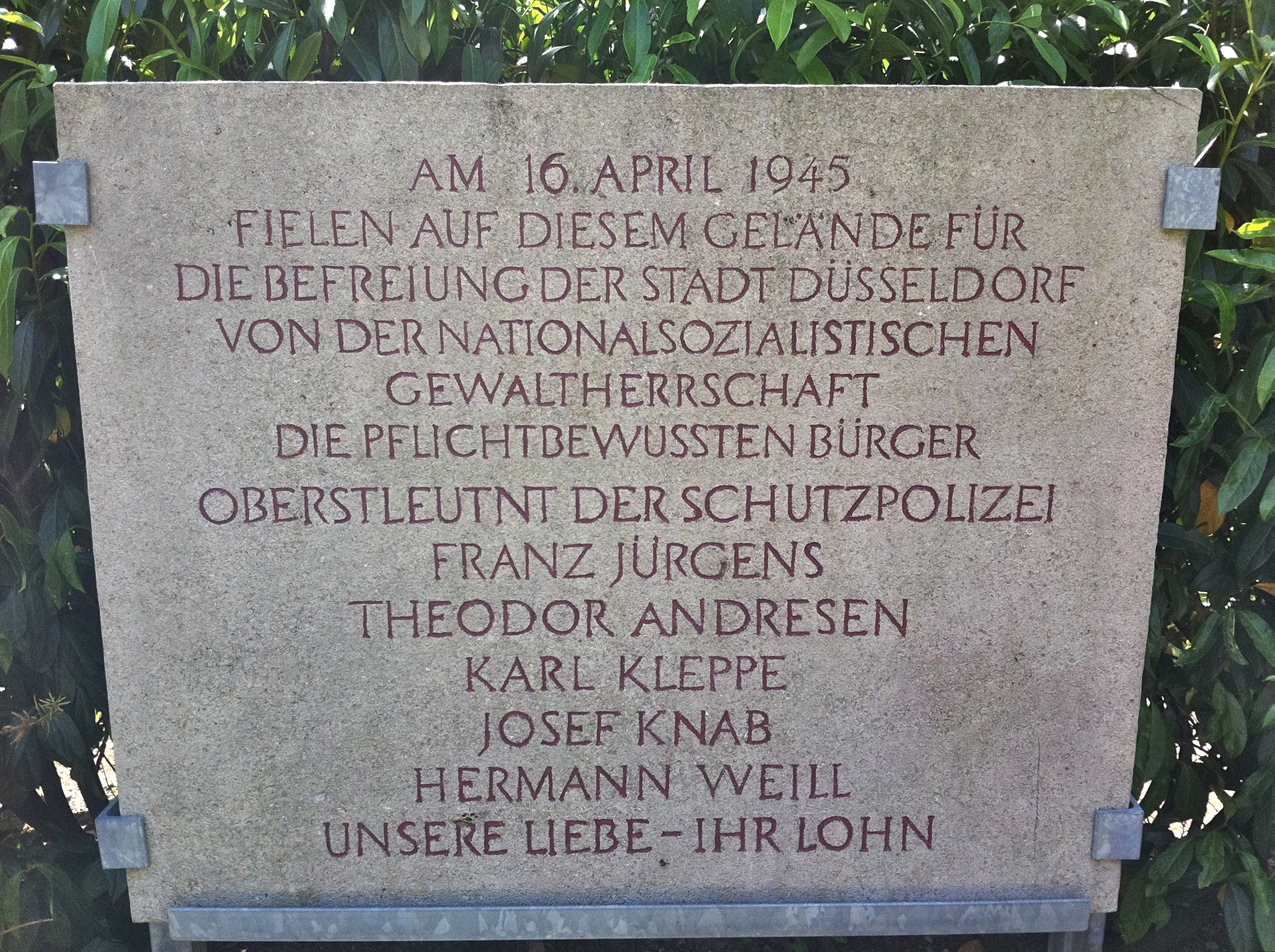 Gedenkstätte und Tafel für Franz Jürgens, Theodor Andresen, Karl Kleppe, Josef Knab und Hermann Weill. Hingerichtet wenige Stunden vor der Kapitulation Düsseldorfs 1945. Hier noch dem Gelände der Berufsschule Färbestraße 34 / Anton-Betz-Straße, Düsseldorf, Germany. Später verlegt zur Anton-Betz-Straße.